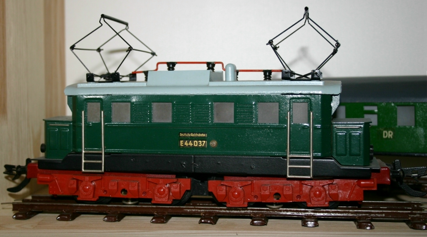 Modell-Lokomotive der Baureihe E 44 von Zeuke & Wegwerth in der Nenngröße 0